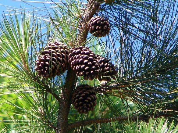 Foto genérica das folhas e frutos da árvore de pinus (Pinus elliottii)